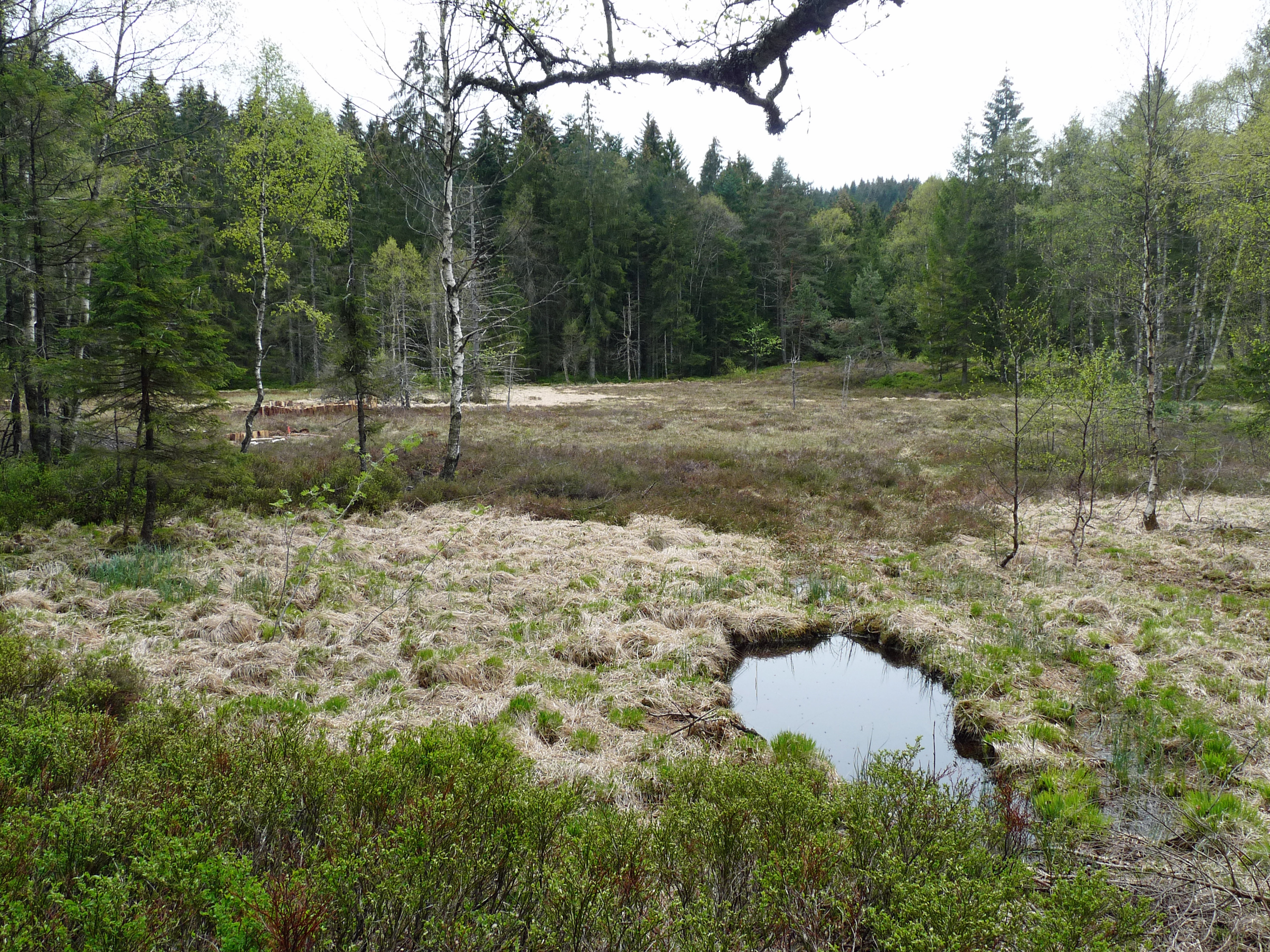 Tourbière du Haut de Mérelle (Gérardmer, Vosges)